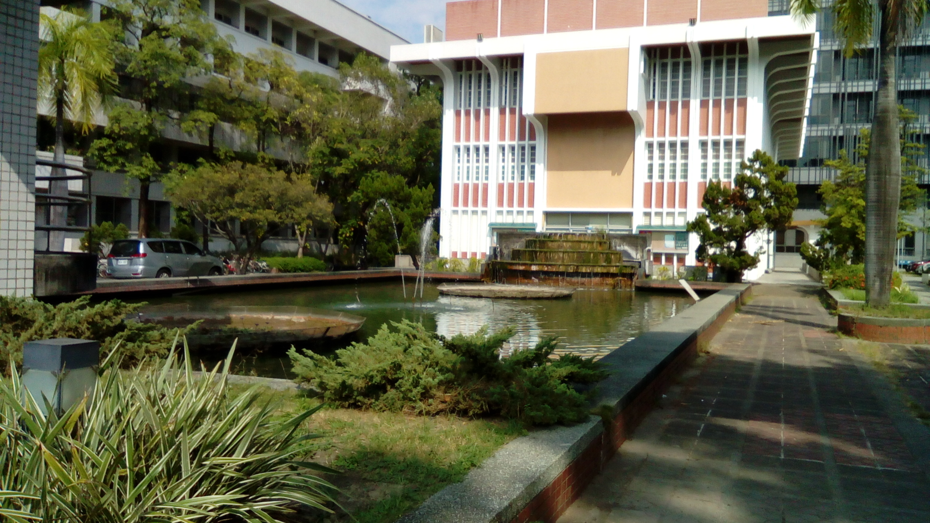 同上